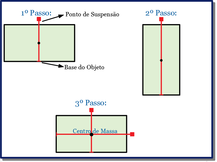 Para a Localização do Centro de Massa em objetos planos (Quadrados, Retângulos etc), utiliza-se o método denominado Linha de Prumo. Para isso, é necessários traçar duas ou mais linhas dentro da área do objeto, revelando como resultado uma intersecção das mesmas no centro do objeto, ou seja, a localização do Centro de Massa.